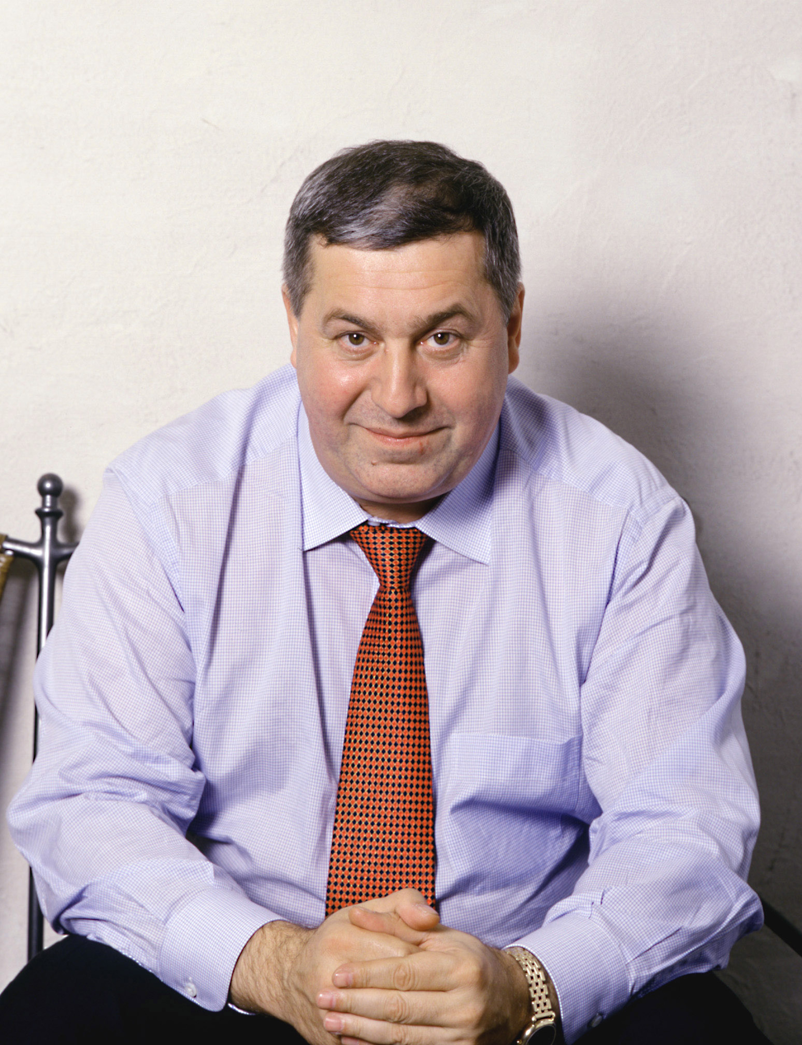 Портрет Президента ОАО НК "РуссНефть" М.С.Гуцериева